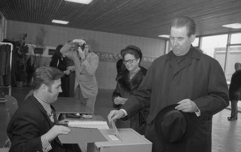 Bundestagswahl 19.11.1972 MdB-CDU Dr. G. Schröder und Frau bei d. Stimmabgabe/Heiderhof